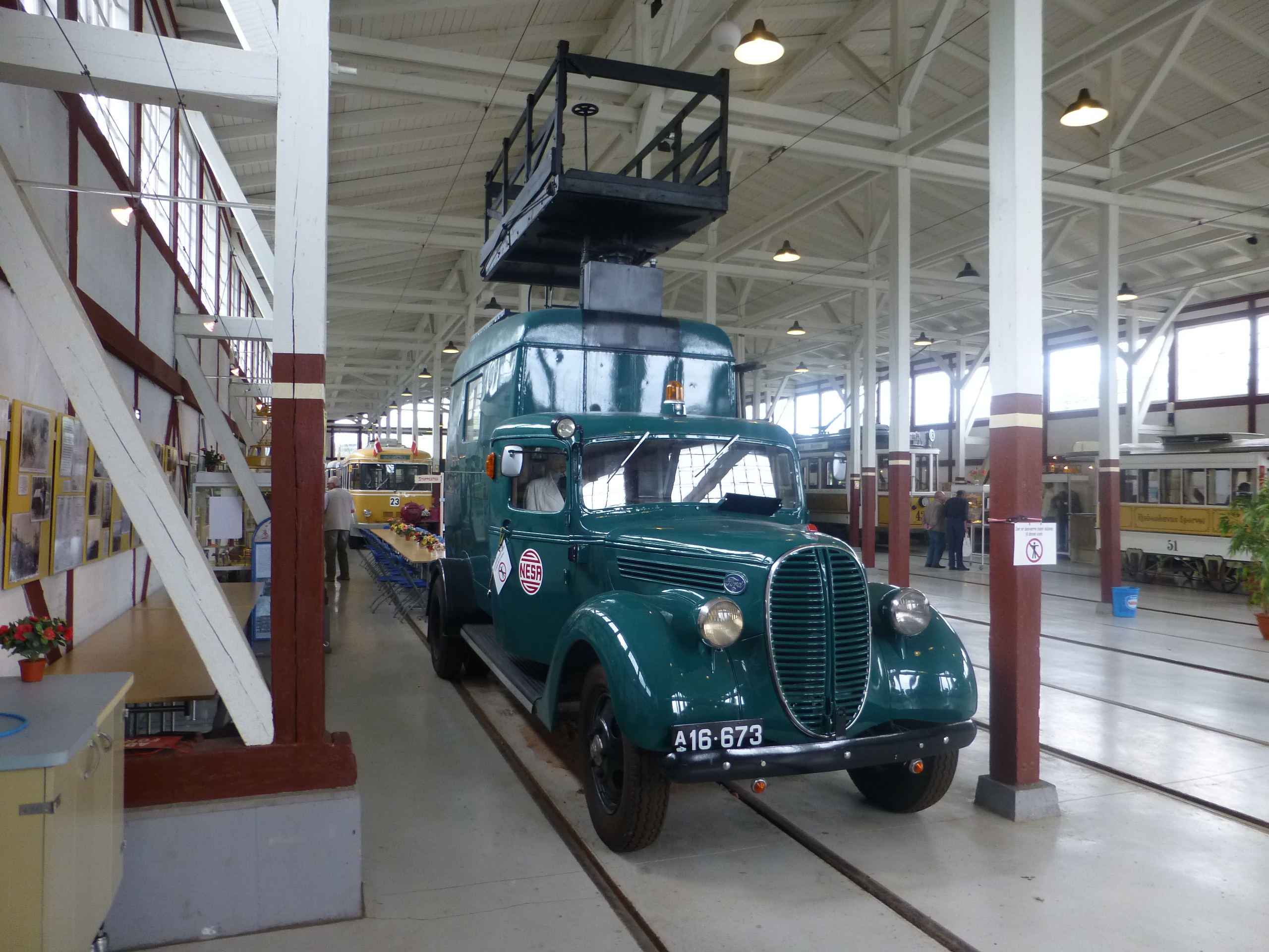 Old service car from Copenhagen NESA 501-02 on Sporvejsmuseet Skjoldenæsholm in Denmark.